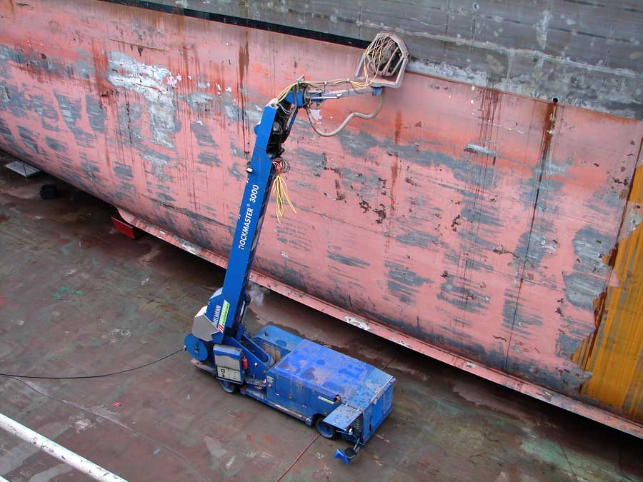 Décapage à très haute pression (2800 bars) du méthanier LNG Port Harcourt, à Brest.